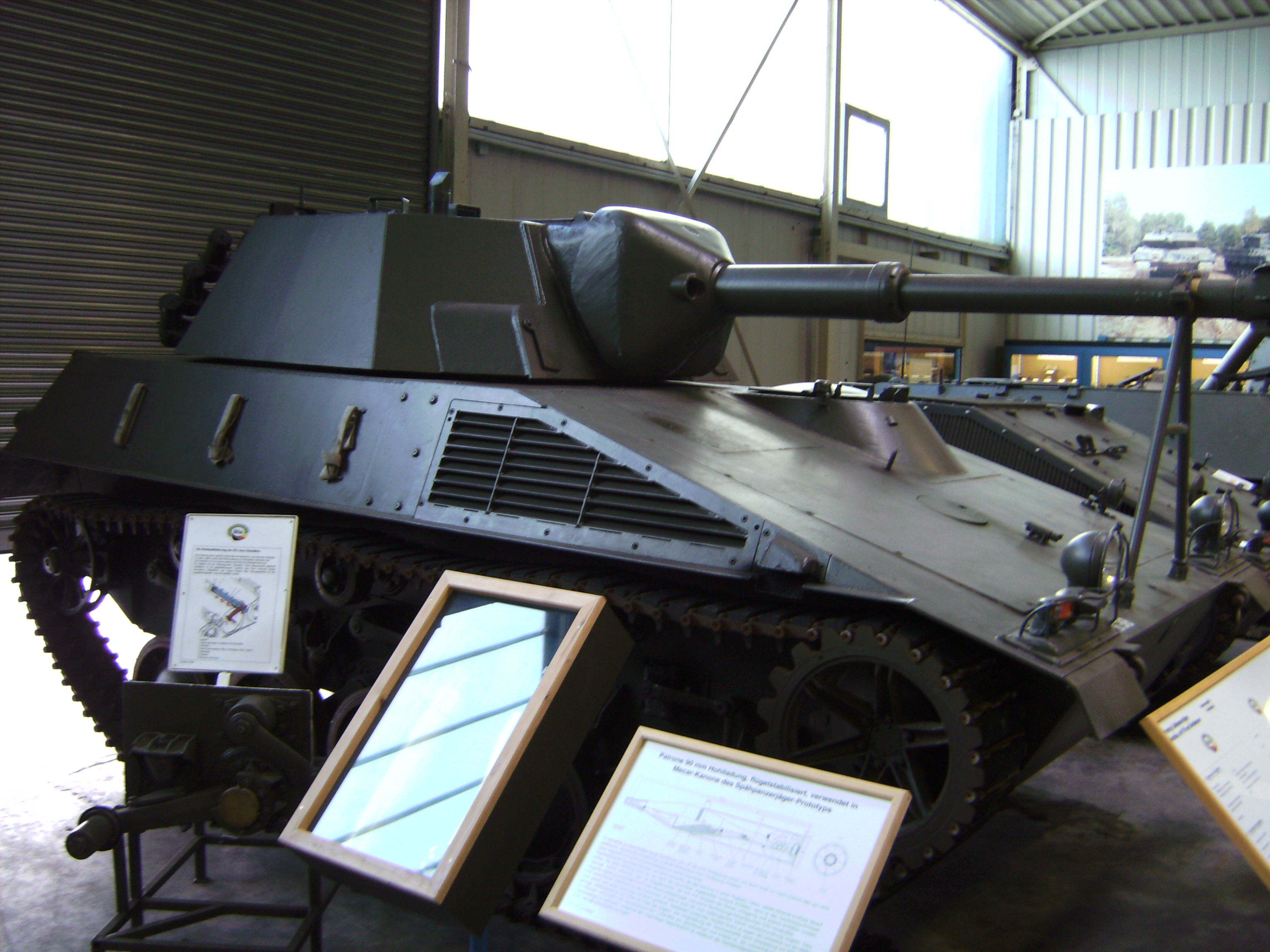 Spähpanzer SC I.C.